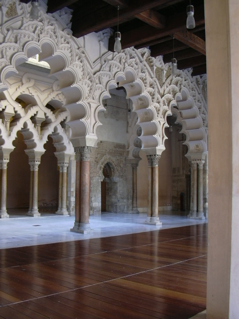 La Aljafería - Palacio taifa